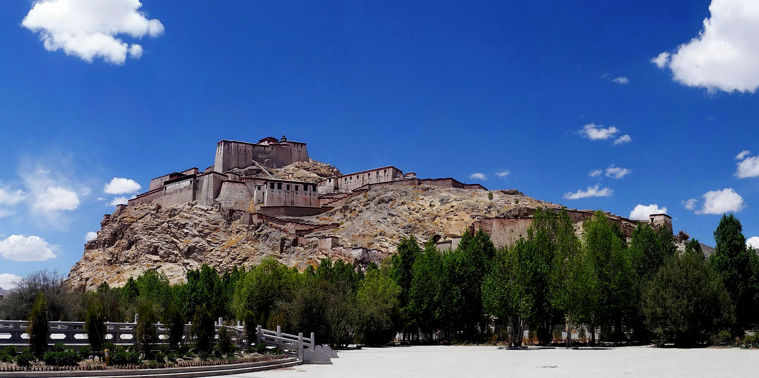 Gyantsé Dzong (citadelle)